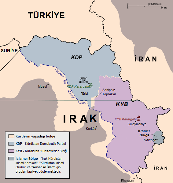 2003 yılında Irak'taki Kürt bölgelerinin Türkçe haritası.